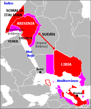 Mapa geopolítico de la Italia de Mussolini.